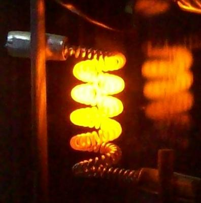 Doppelwendel 24V/75W, betrieben mit 2 Volt, Höhe der Wendel ca. 5mm